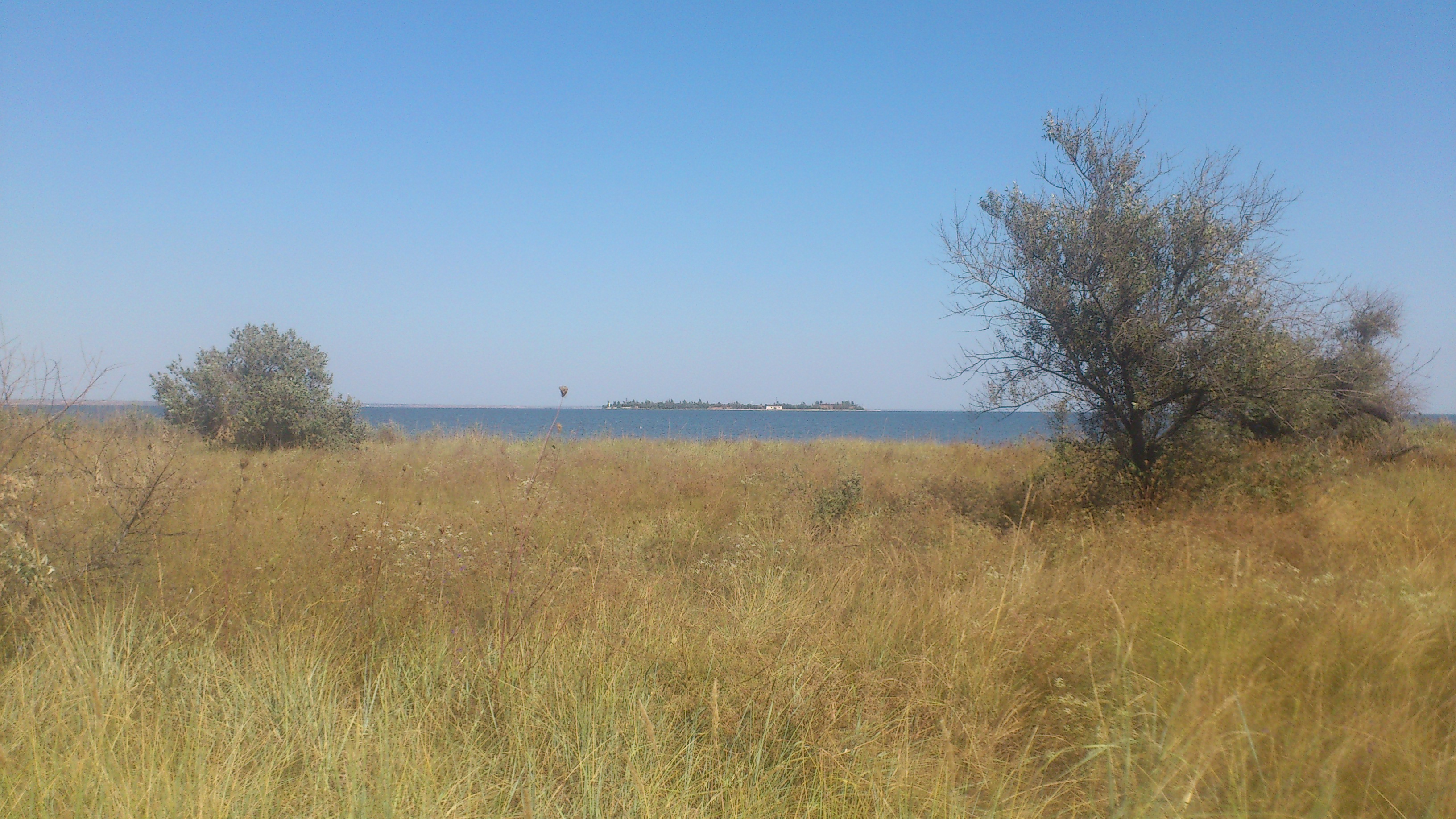 Кінбурнська коса, вид на острів Майський